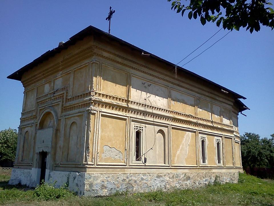 Biserica „Sf. Procopie”- Domnească